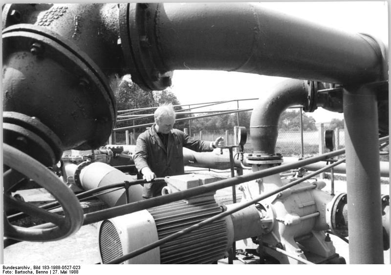 LPG Satow-Kogel, Kontrolle der Pumpstation ADN-ZB Bartocha 27.5.88 Bez. Neubrandenburg: Wasser nach Maß. Regelmäßig überprüft Werner Steinhäuser, Bereichsleiter Beregnung in der LPG Satow-Kogel die zwei Pumpstationen am Plauener und Kogeler See. Stündlich können beide bis zu 4400 Kubikmeter Wasser auf die Felder befördern. Information added by Wikimedia users.Berichtigung:ADN-ZB Bartocha 27.5.88 Bez. Neubrandenburg: Wasser nach Maß. Regelmäßig überprüft Werner Steinhäuser, Bereichsleiter Beregnung in der LPG Satow-Kogel die zwei Pumpstationen am Plauer und Kogeler See. Stündlich können beide bis zu 4400 Kubikmeter Wasser auf die Felder befördern.